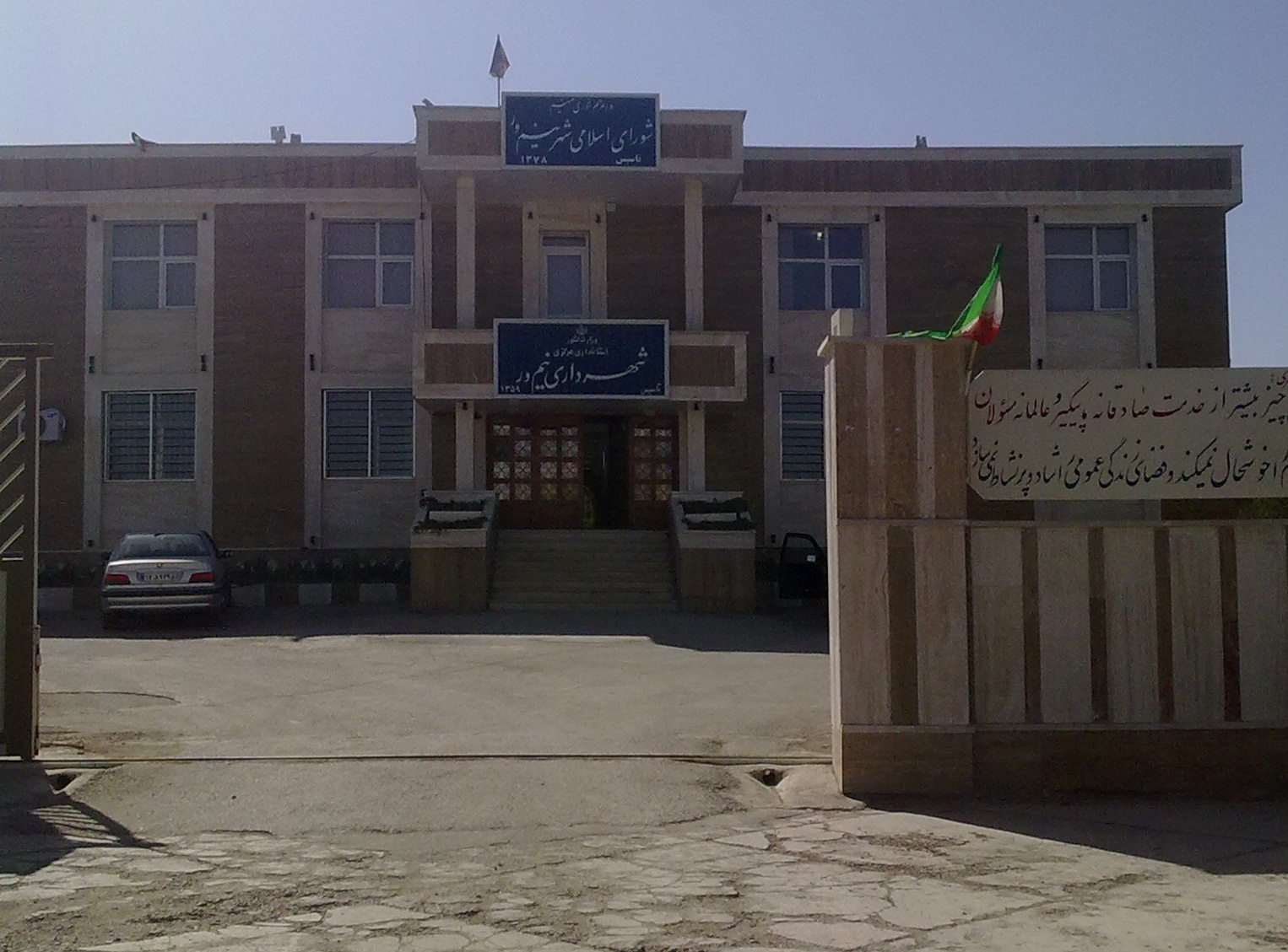 NimVar municipality ساختمان شهرداری نیم‌ور